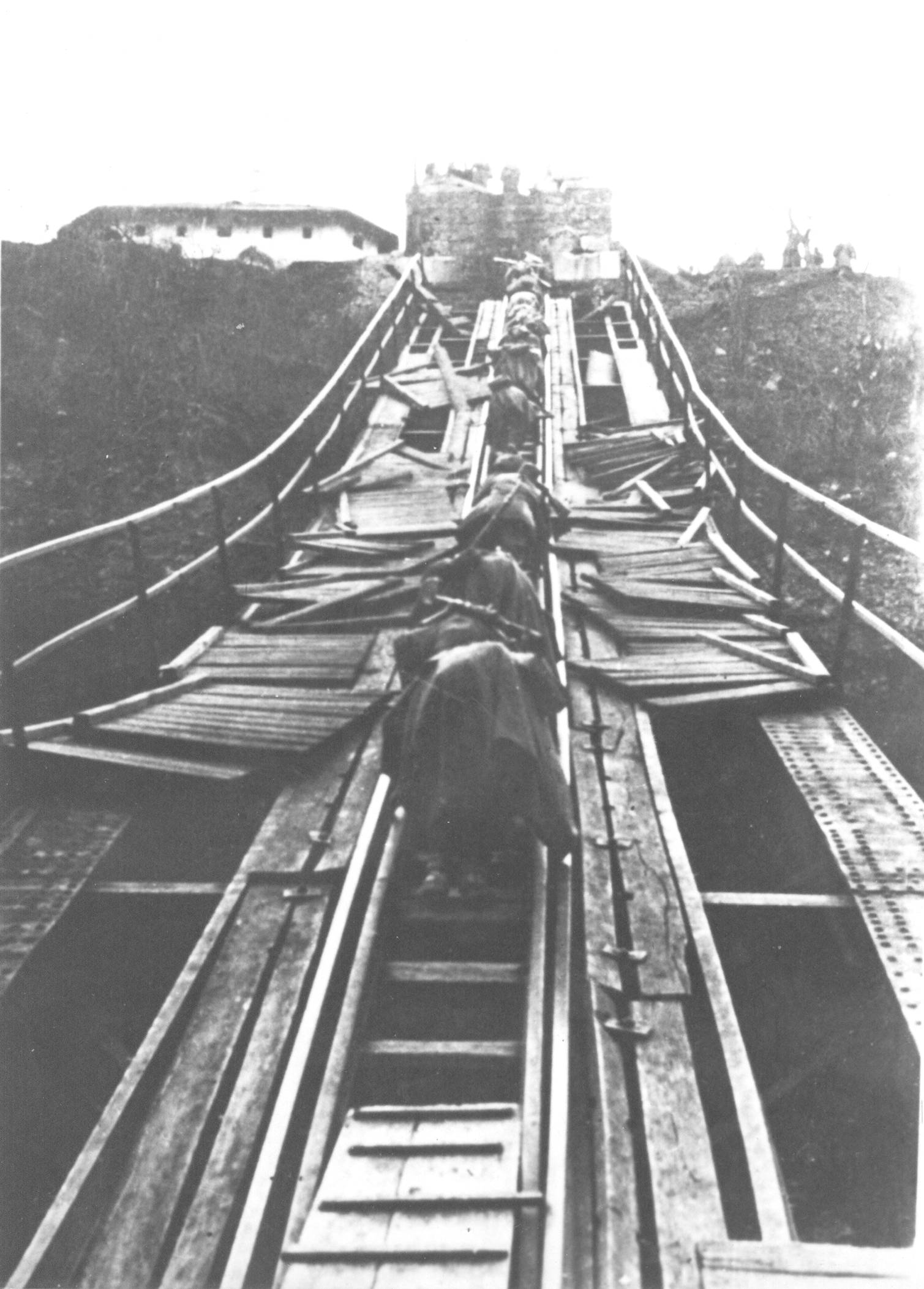 Srpskohrvatski / српскохрватски: Neretva 1943 godine - borci II proleterske brigade prelaze preko porušenog mosta na Neretvi, početkom marta.